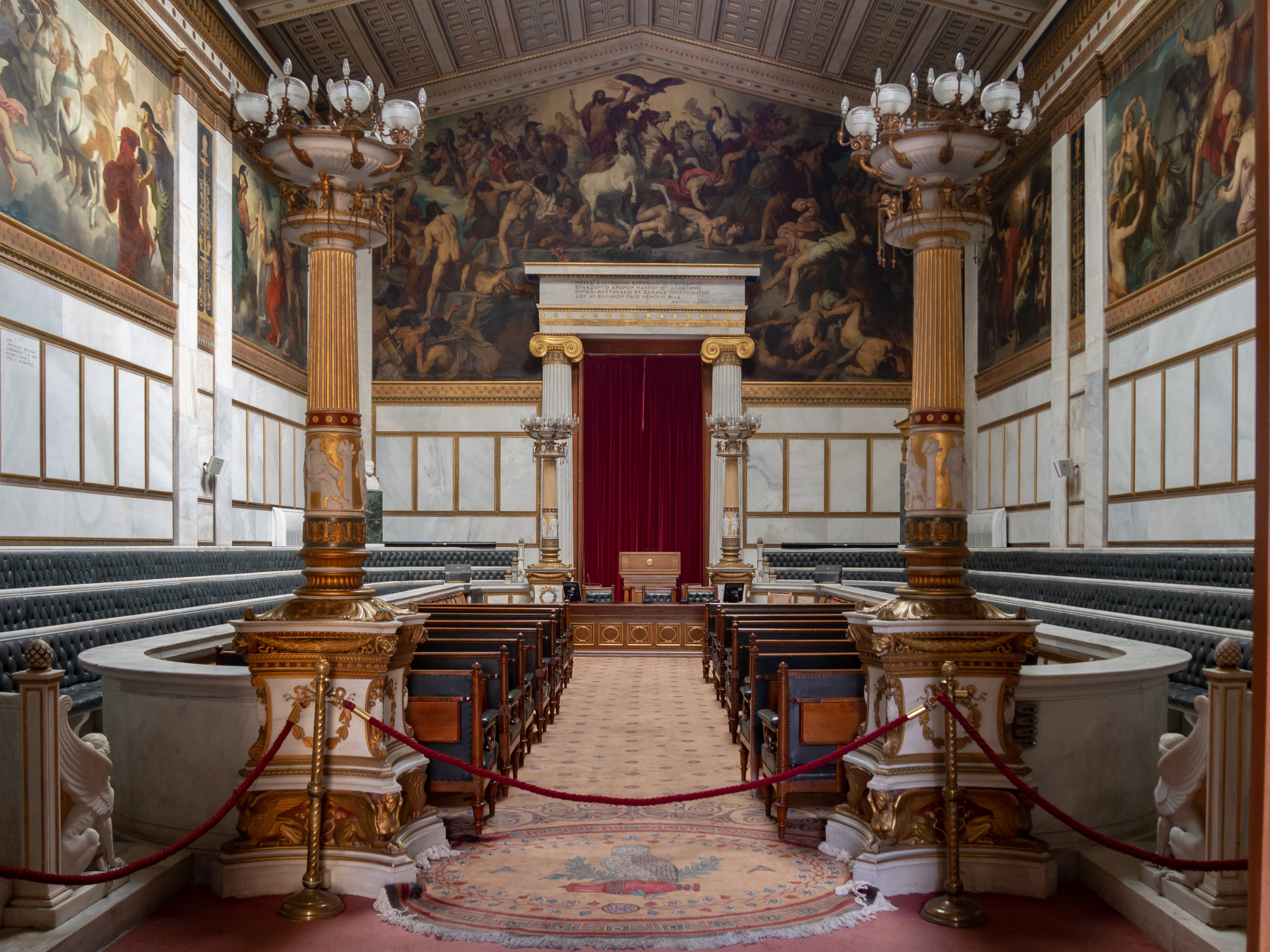 Ακαδημία Αθηνών«Μέγαρο Ακαδημίας Αθηνών»